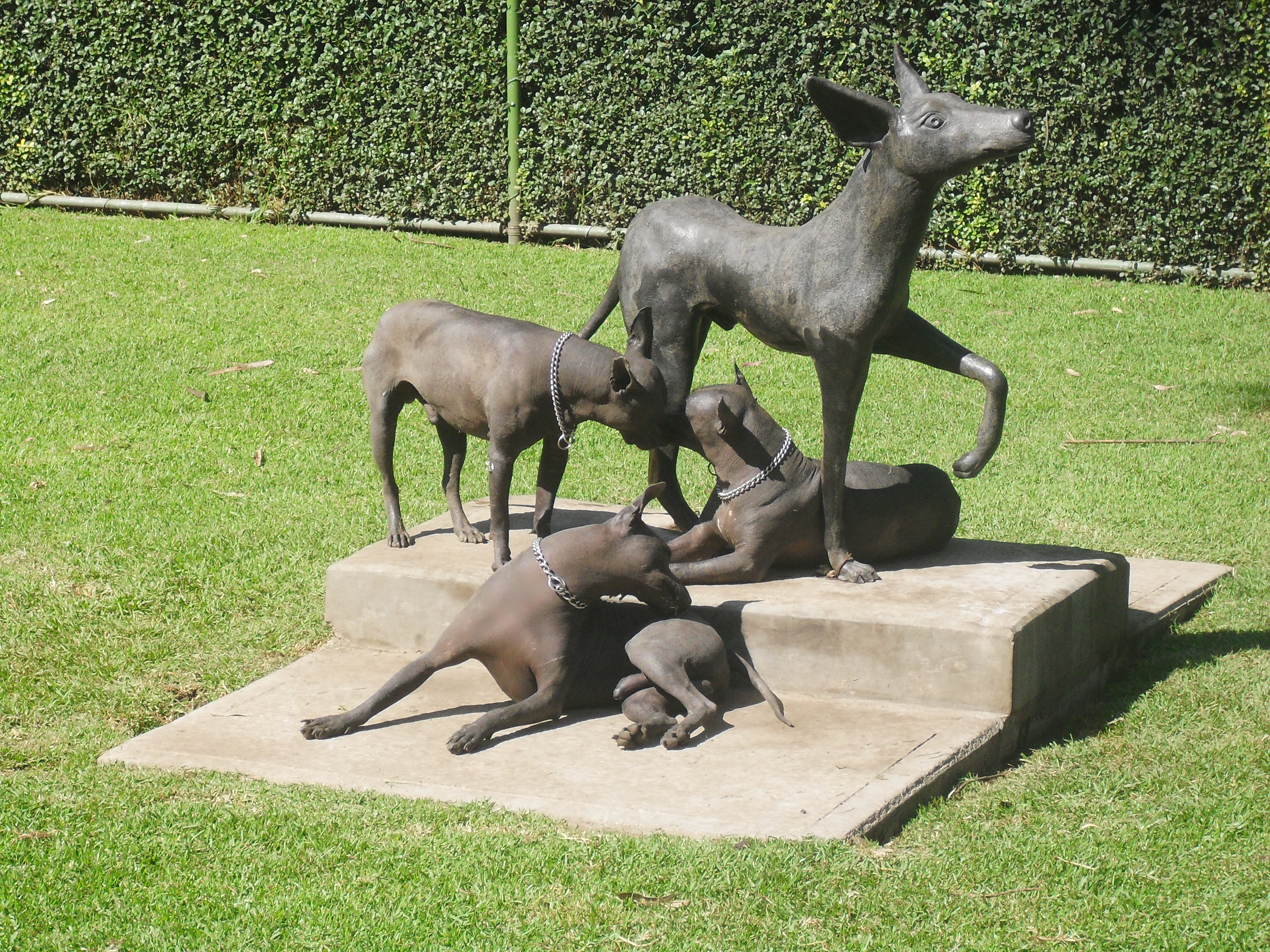 Perros xoloitzcuintles que se encuentran en los jardines del museo